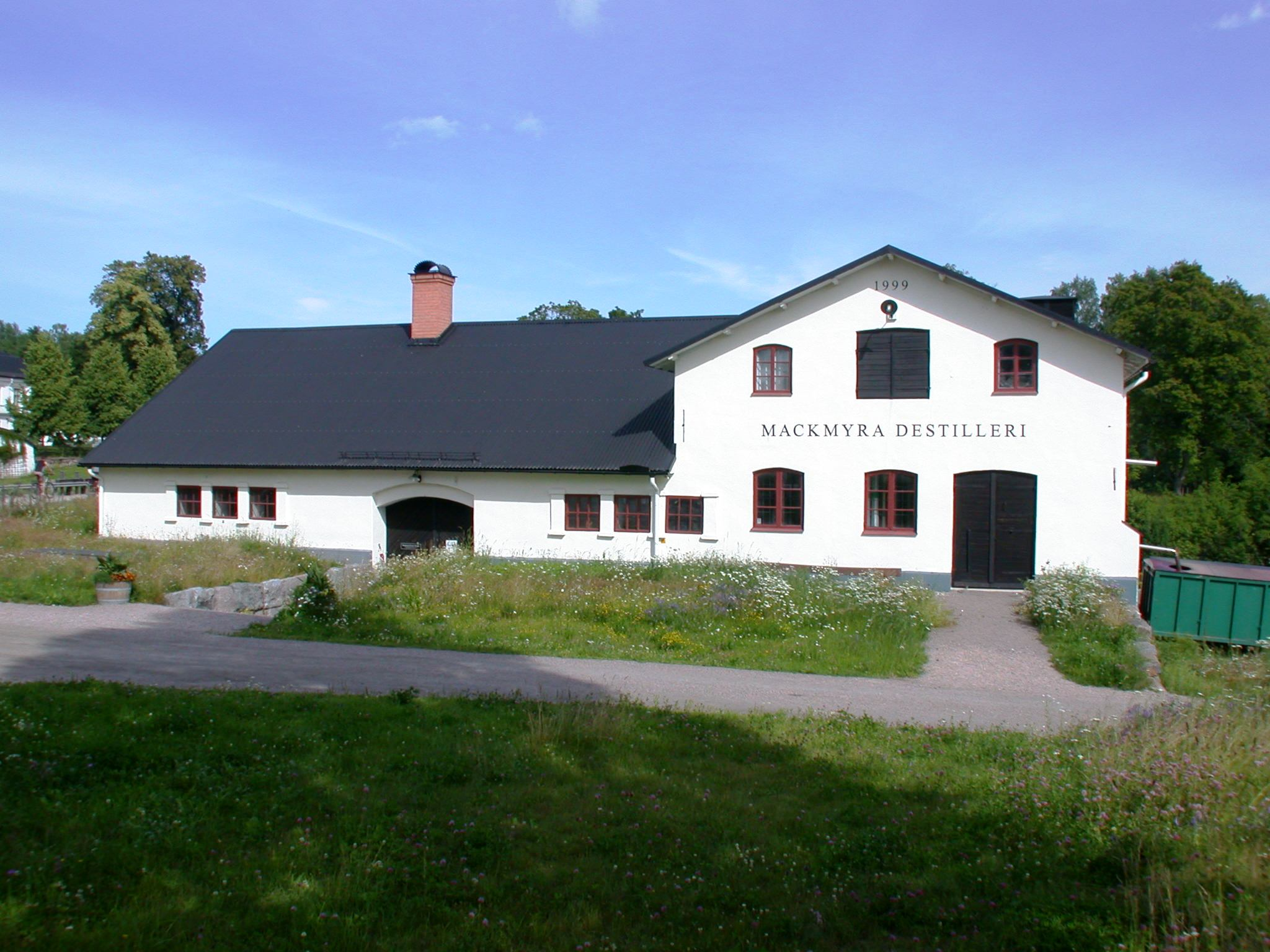 Mackmyra bruk (distillery)